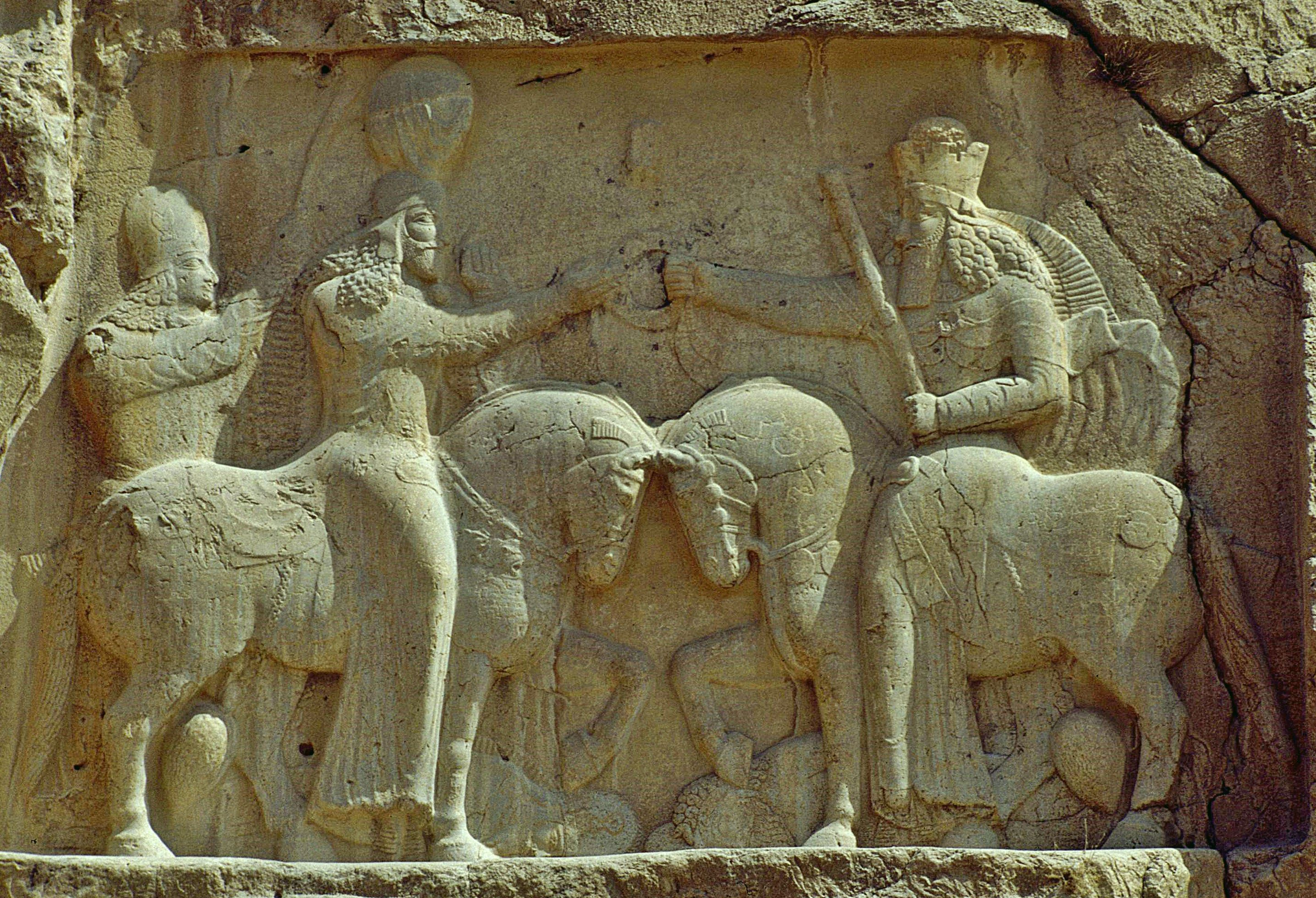 Naqsh-e Rustam: Investitur Ardechirs I.